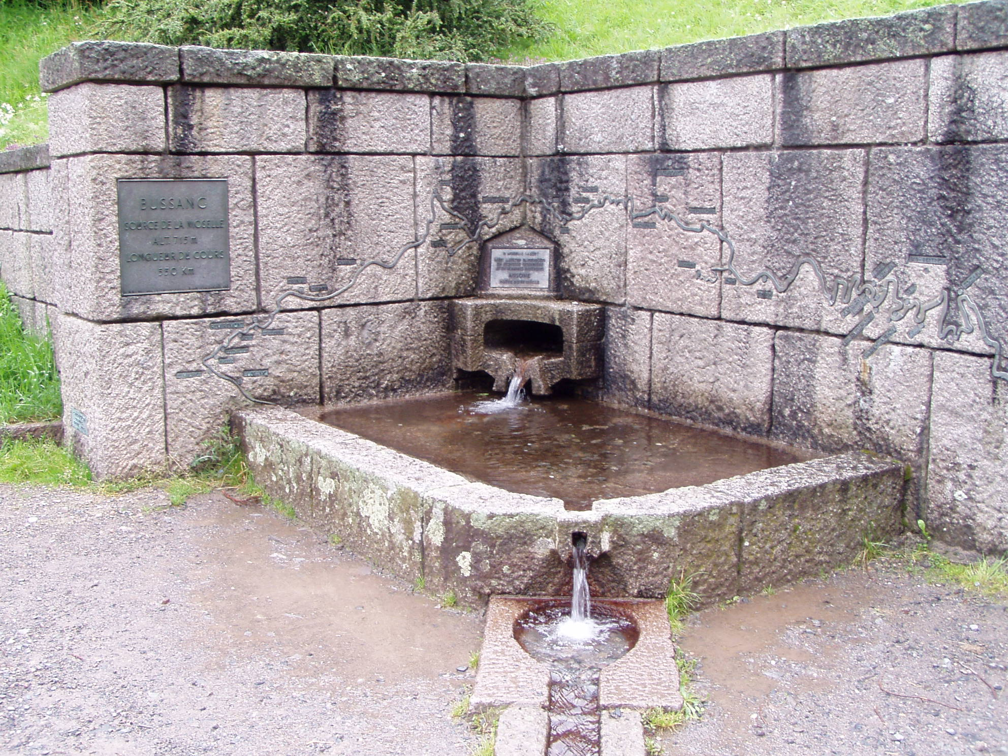 Source de la Moselle : La fontaine située à 731 mètres d'altitude, près du col de Bussang, est présentée comme la source officielle. Mais la Moselle (rivière) se forme de la réunion de plusieurs ruisseaux dont certains sourdent à plus de 1000 mètres, sur les pentes du Grand Drumont.